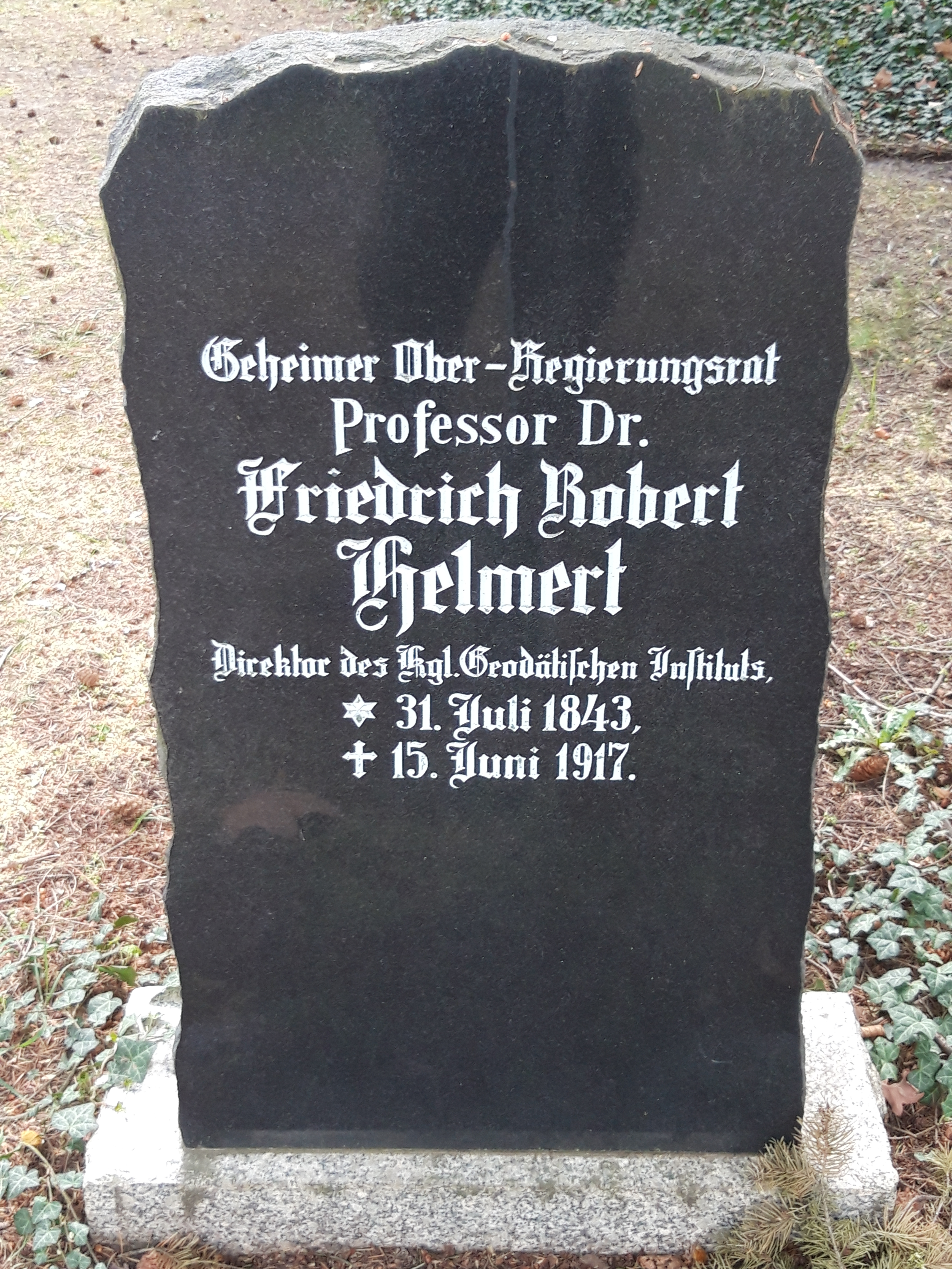 Grabmal Friedrich Robert Helmert auf dem Alten Friedhof Potsdam